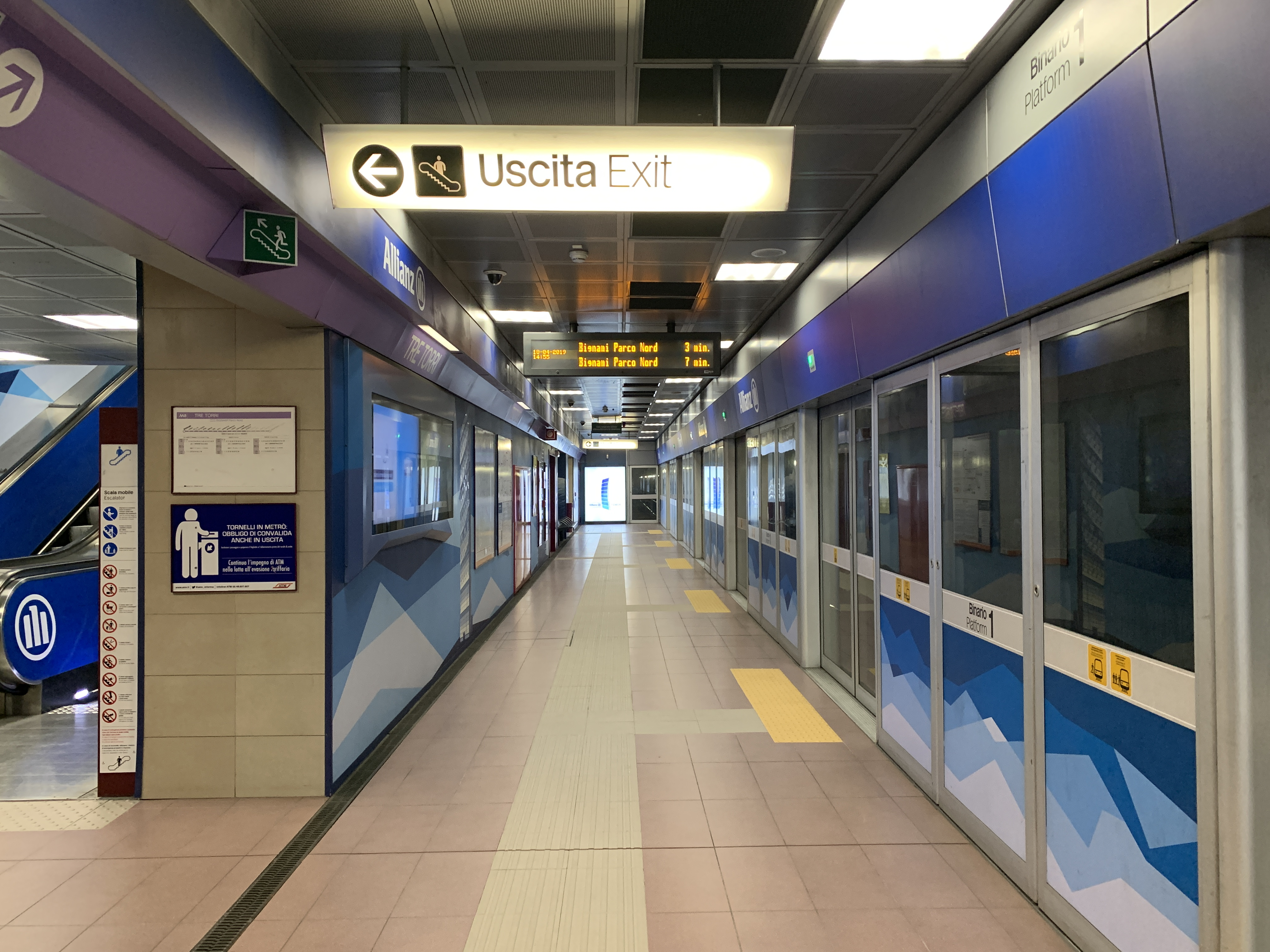 Banchina stazione Tre Torri.